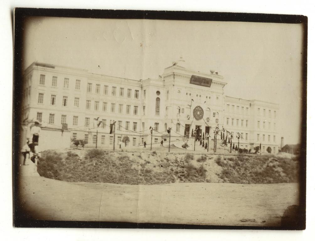 Тифлис.Выставка в Гимназии